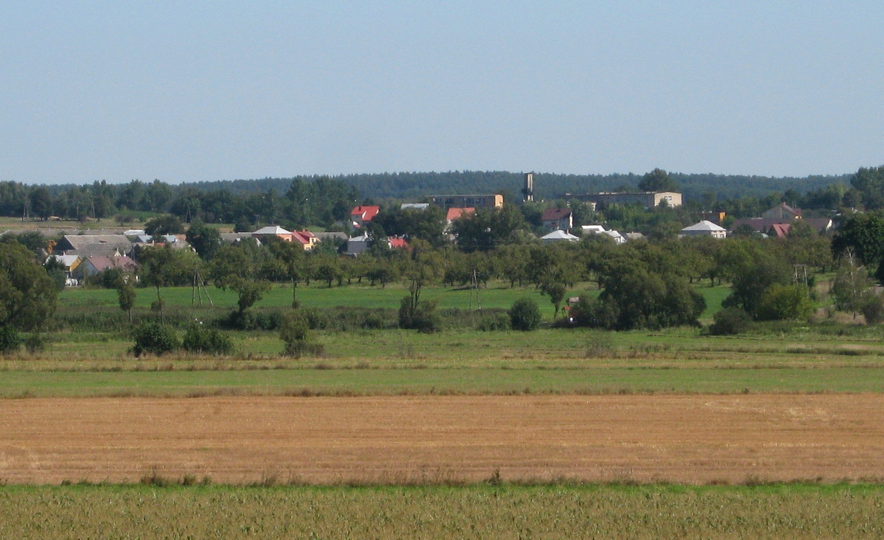 Grabowo – widok od strony zachodniej